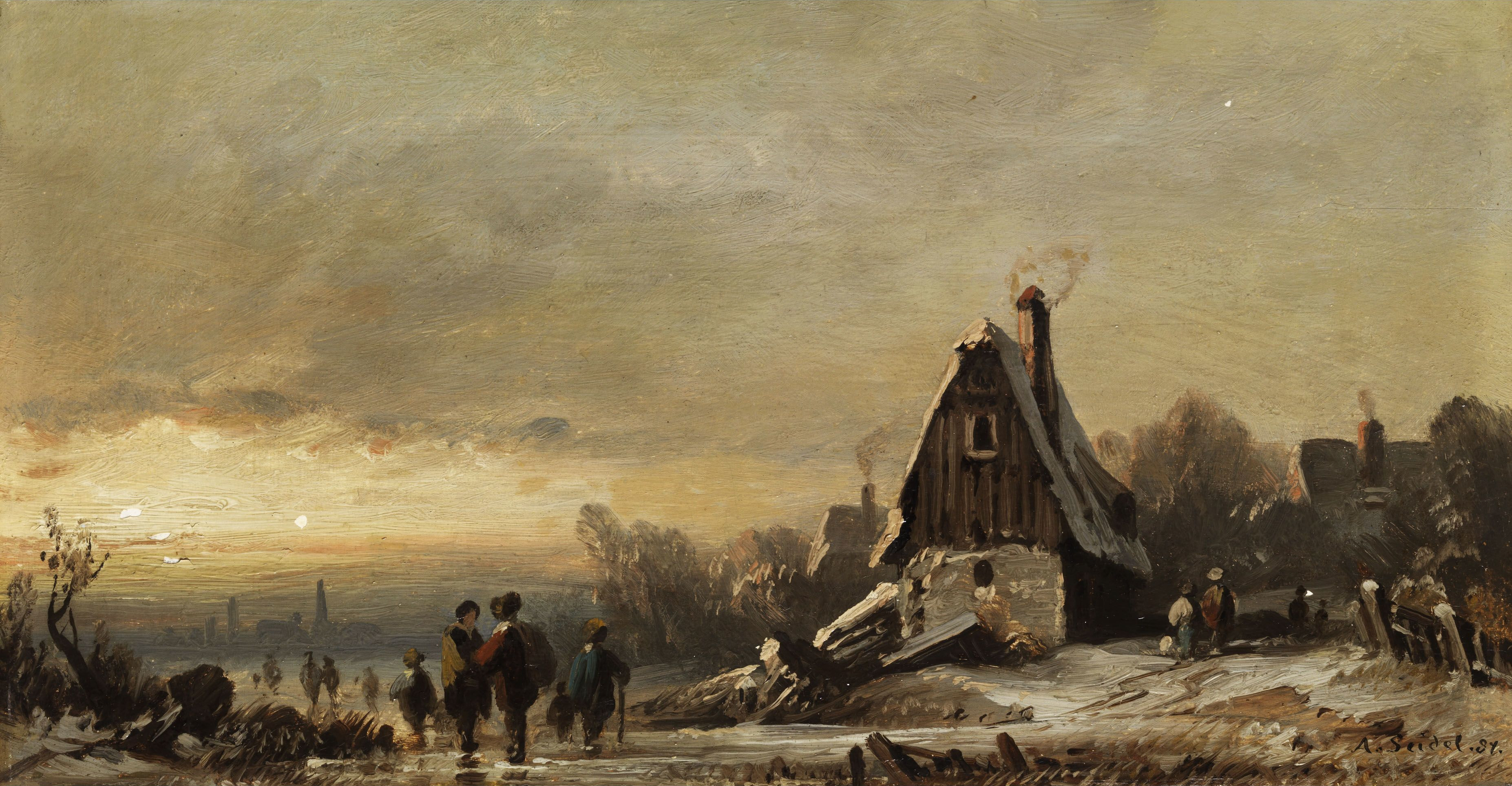 Winterlandschaft. Öl auf Holz. 16 x 33 cm. Rechts unten signiert und datiert (18) „94“.